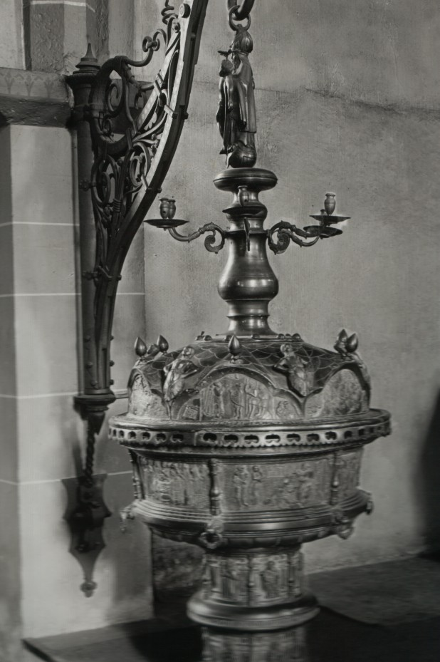 Bronzetaufbecken in St. Marien